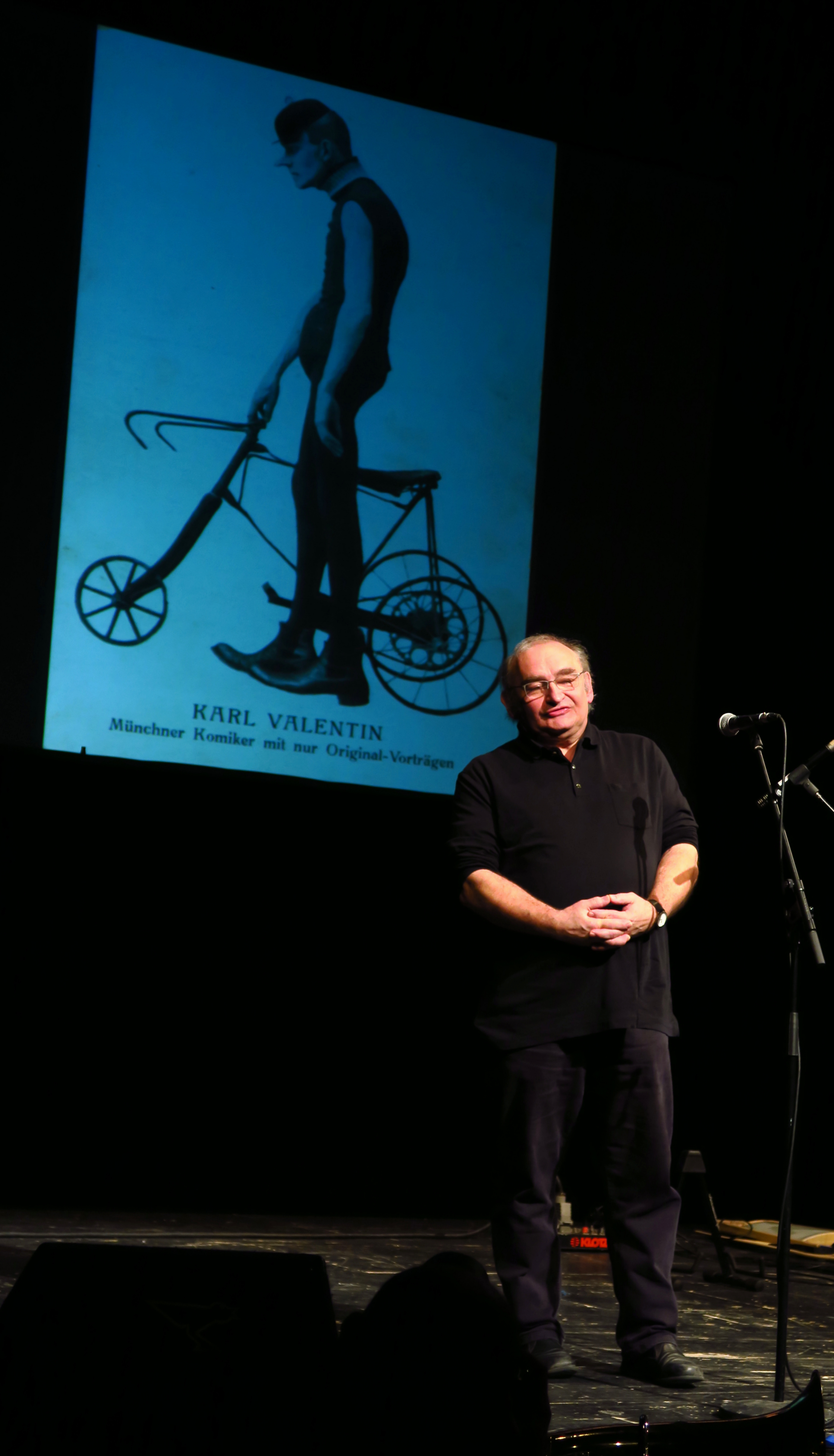 Großer Karl-Valtentin-Preis Verleihung am 19. März 2017 an Sigi Zimmerschied im Münchner Volkstheater